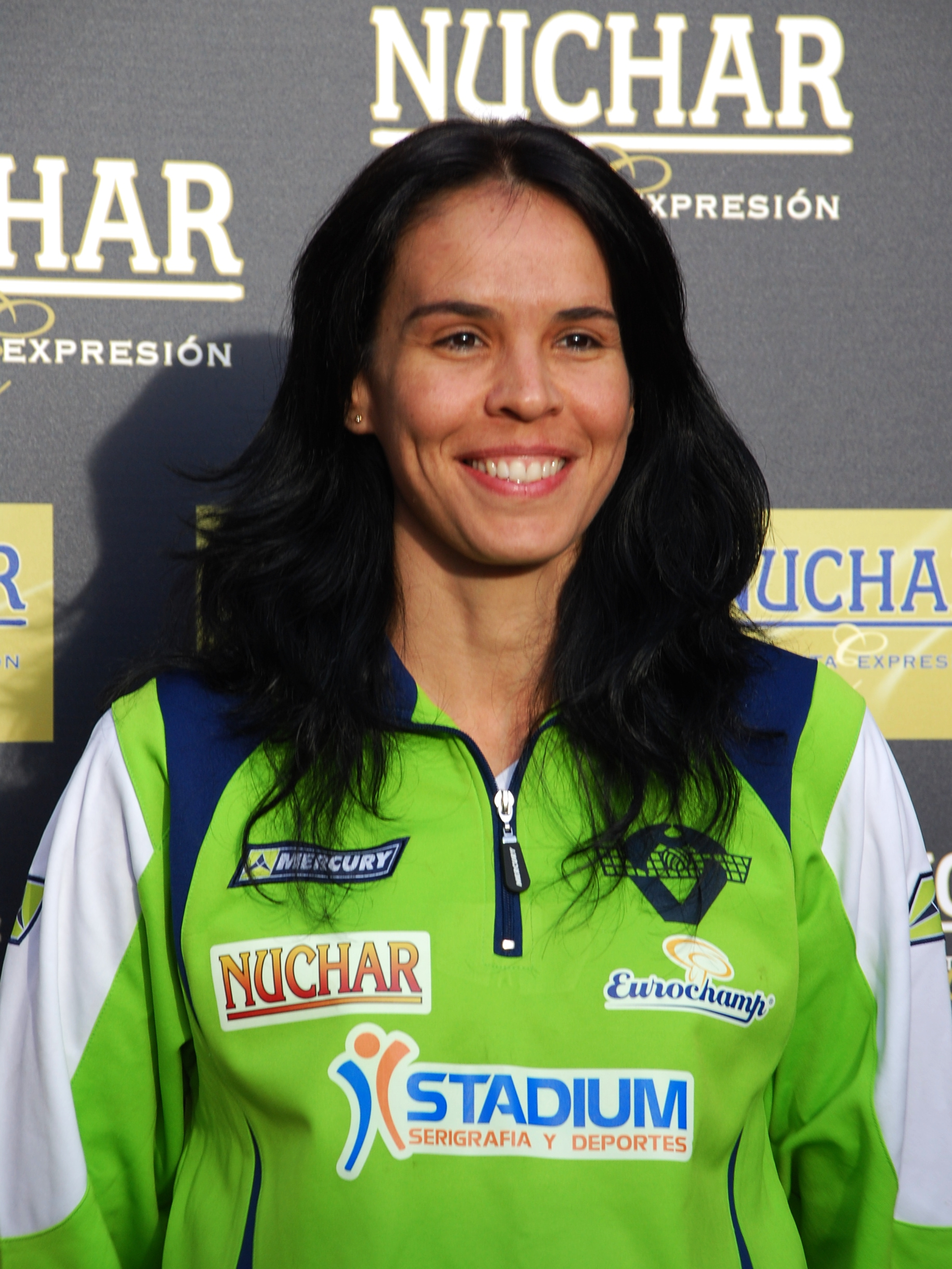 Lilian Ferreira, jugadora de voleibol.